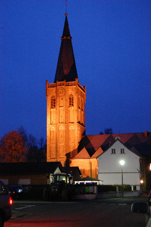 Nachtaufnahme, St. Martinus Niederembt